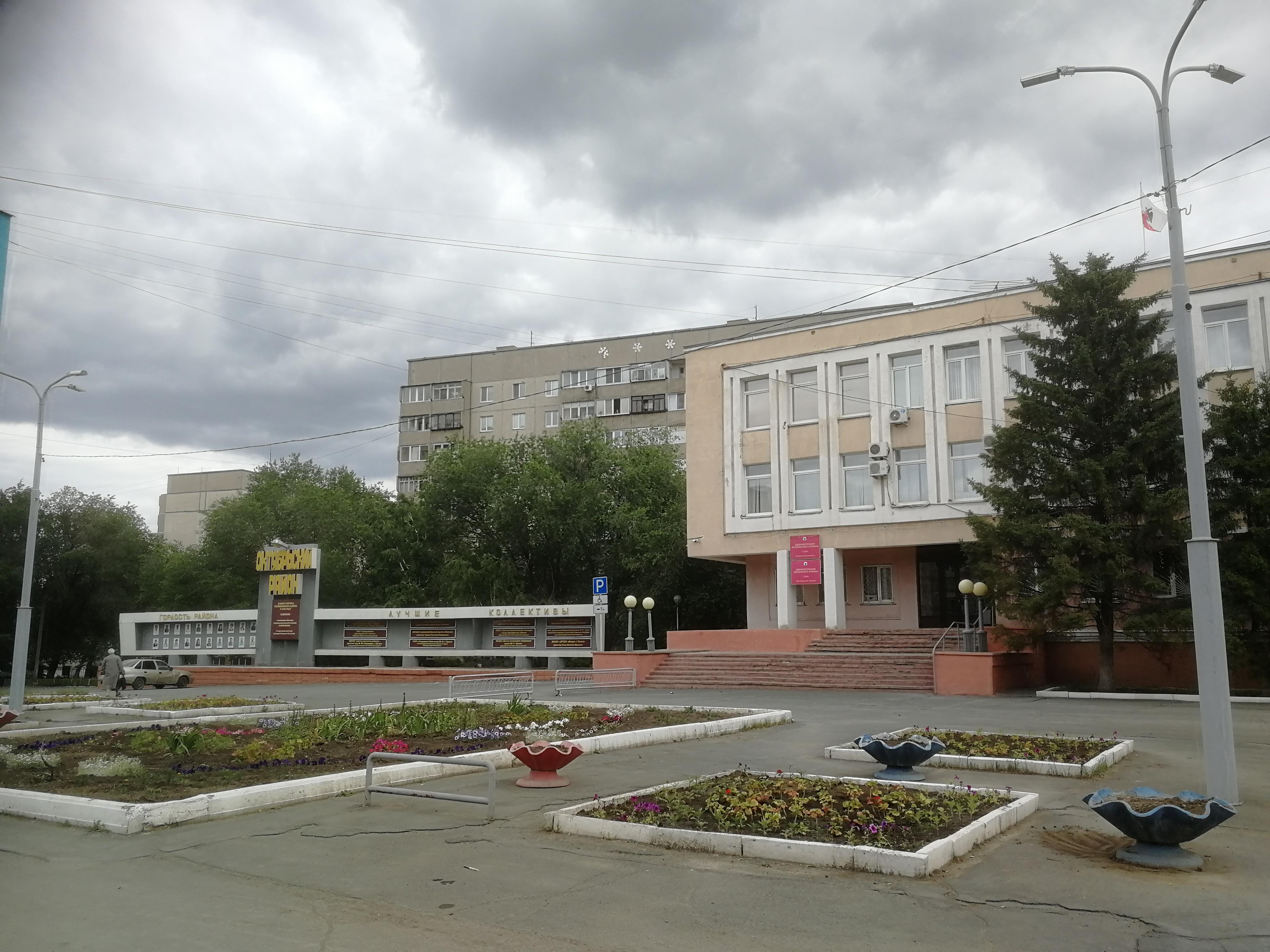 Администрация Октябрьского района города Орска